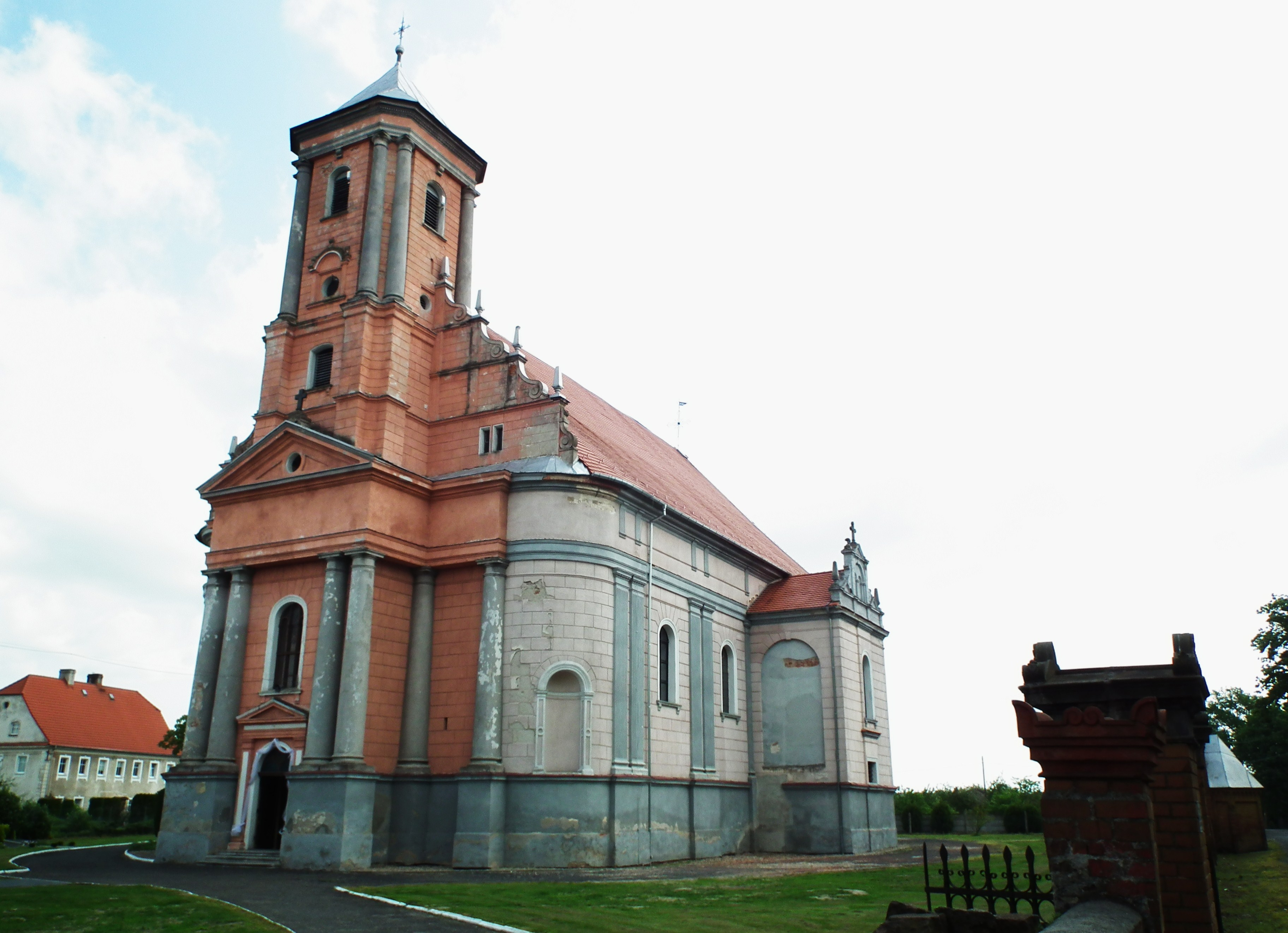 Kopice - kościół parafialny Świętego Krzyża.